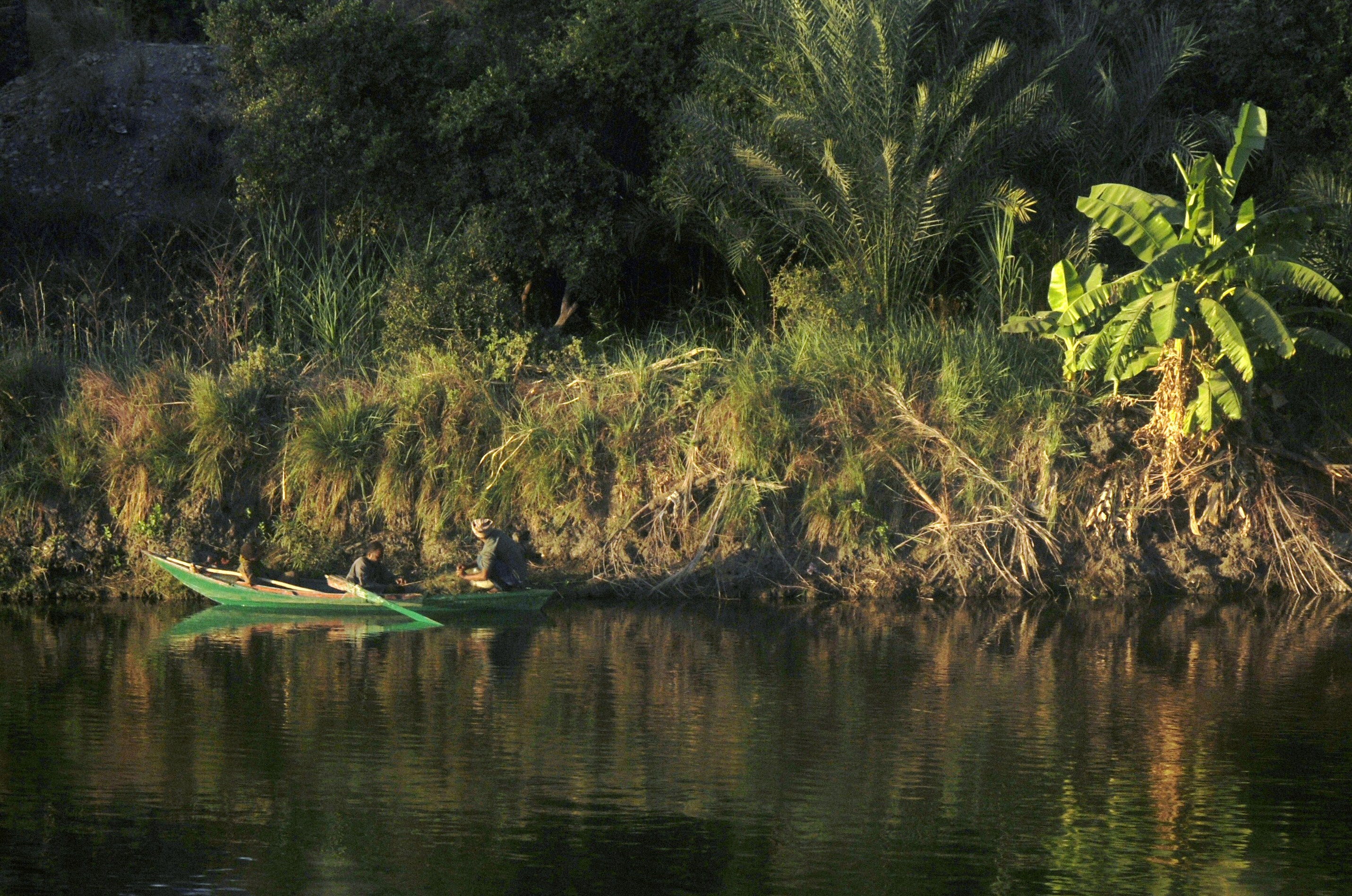 埃及 运河上的渔夫